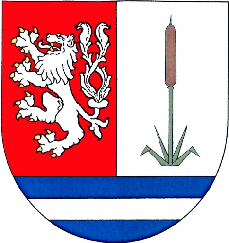 znak, Rohozná, okres Svitavy